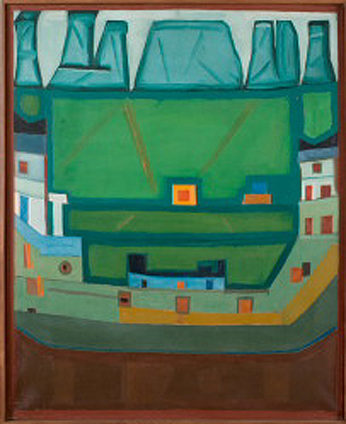 "Miasto u stóp gór (Pejzaż)" by Jerzy Nowosielski -from the permanent collection of Zachęta National Gallery of Art (Warsaw, Poland)